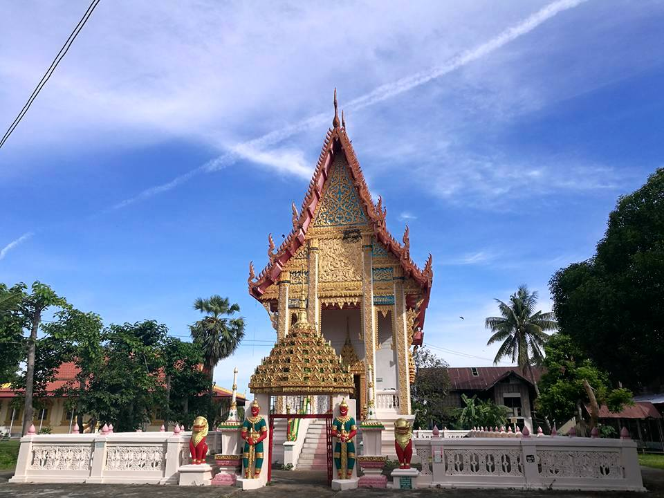 พระอุโบสถวัดโพธิ์ตาก อ.พิบูลมังสาหาร